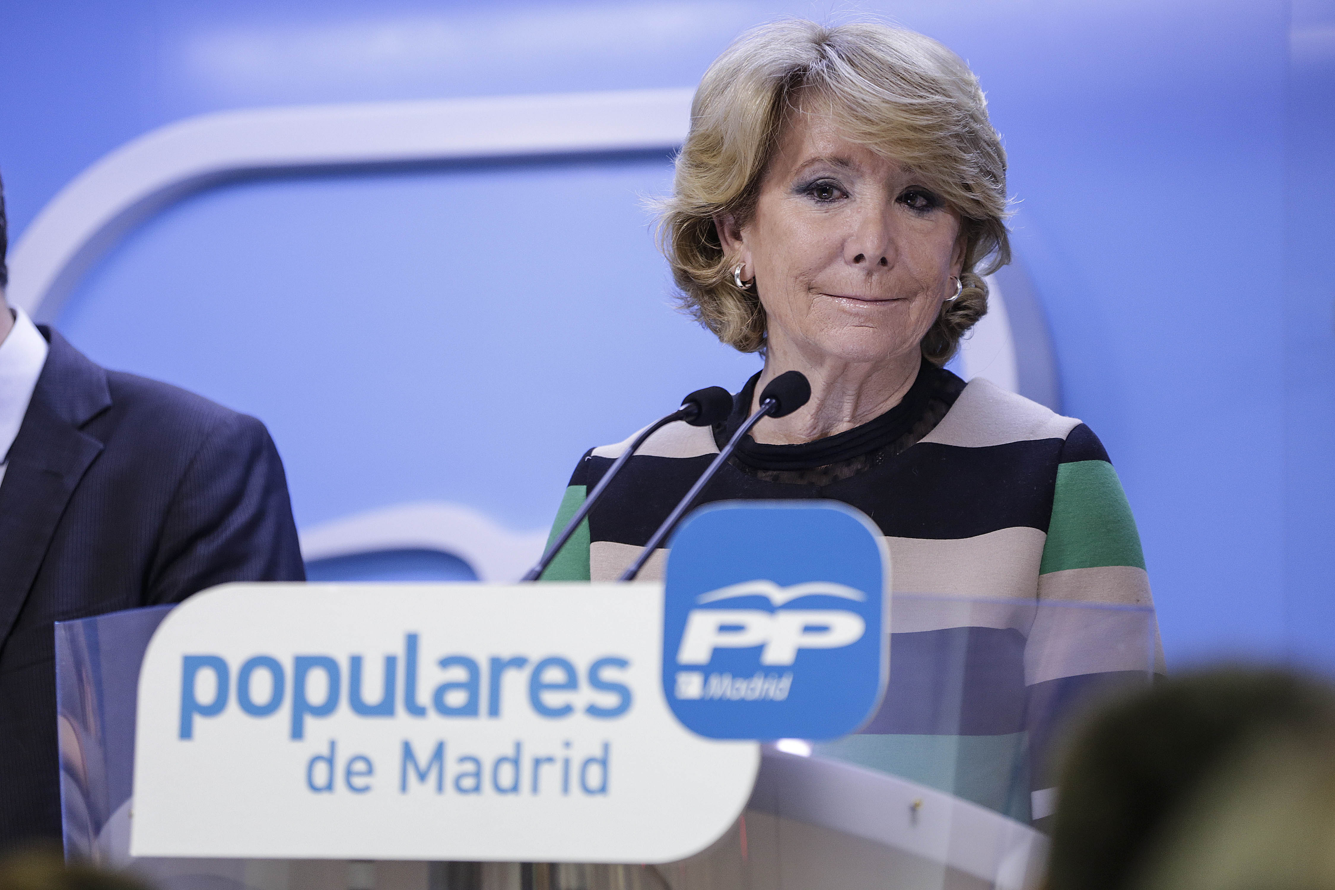 Comité de Dirección Regional